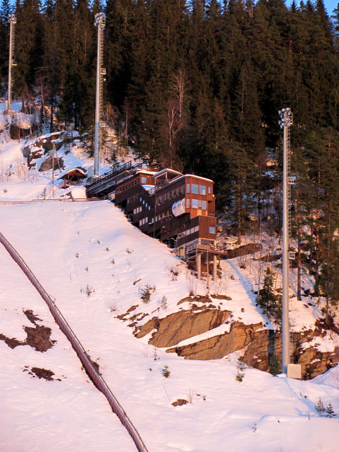 Dommertårnet for skiflyvningsbakken (K185) i Vikersund Hoppsenter, Modum kommune, Buskerud fylke, Norge